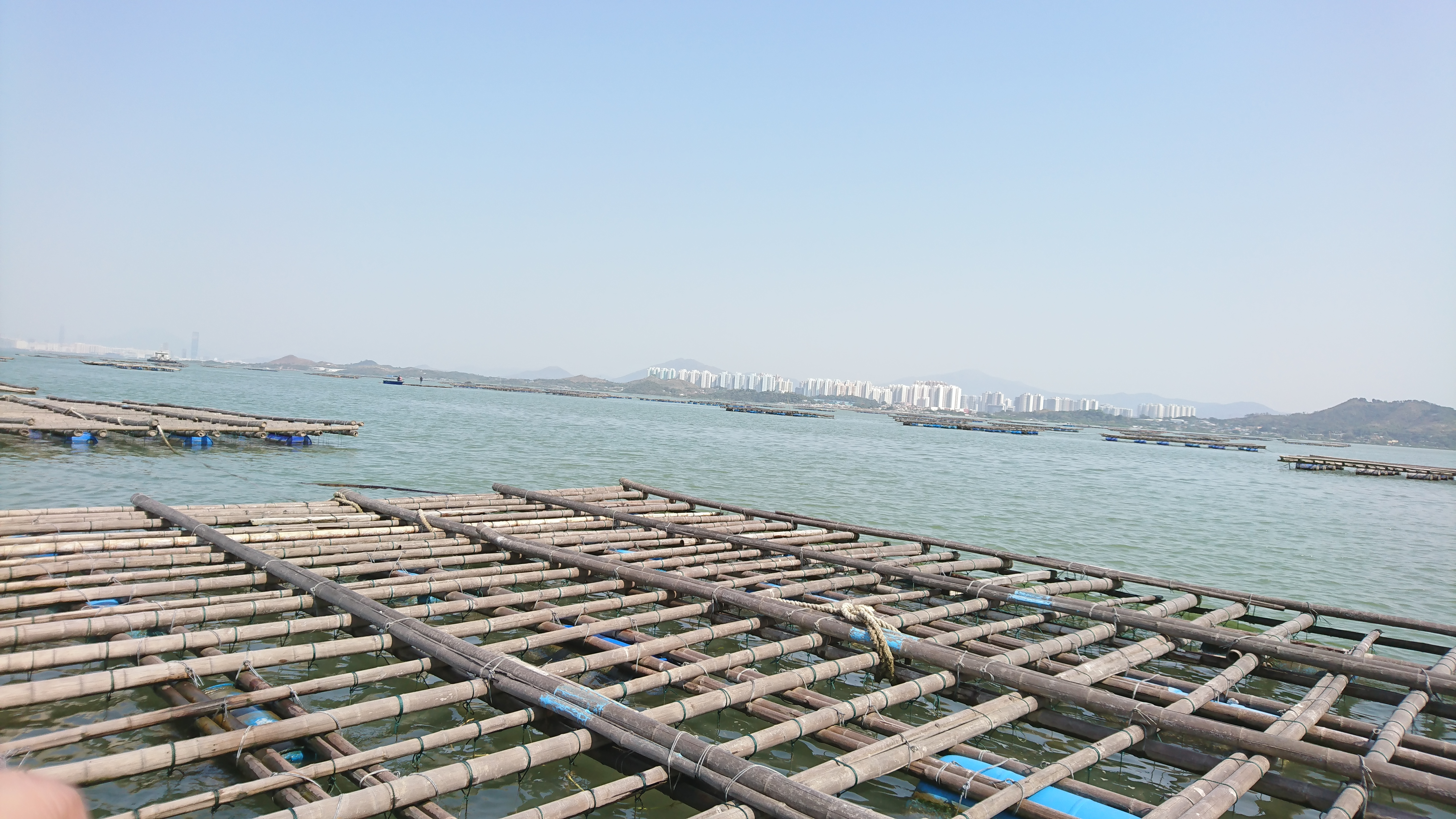 流浮山蠔排